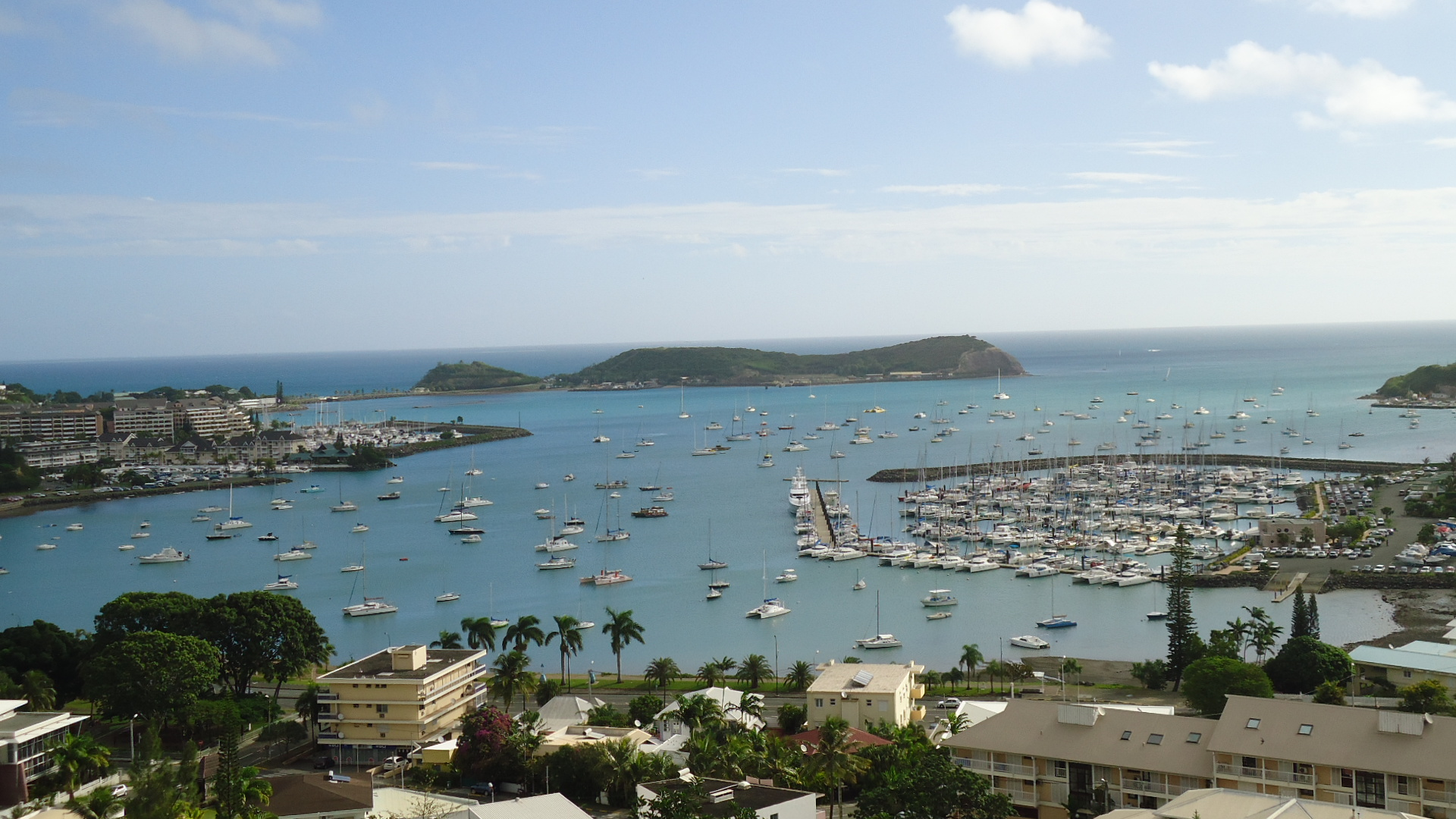 Vue sur la baie de l'Orphelinat depuis le Mont Vénus à Nouméa